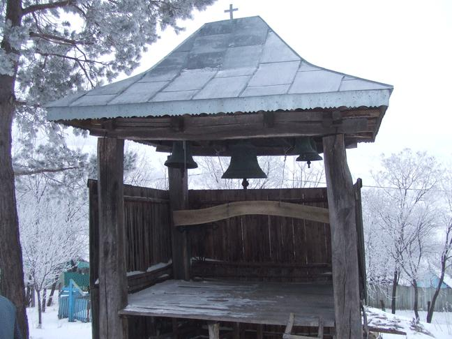 Biserica de lemn din Căpuşneni, Clopotniţa Căpuşneni